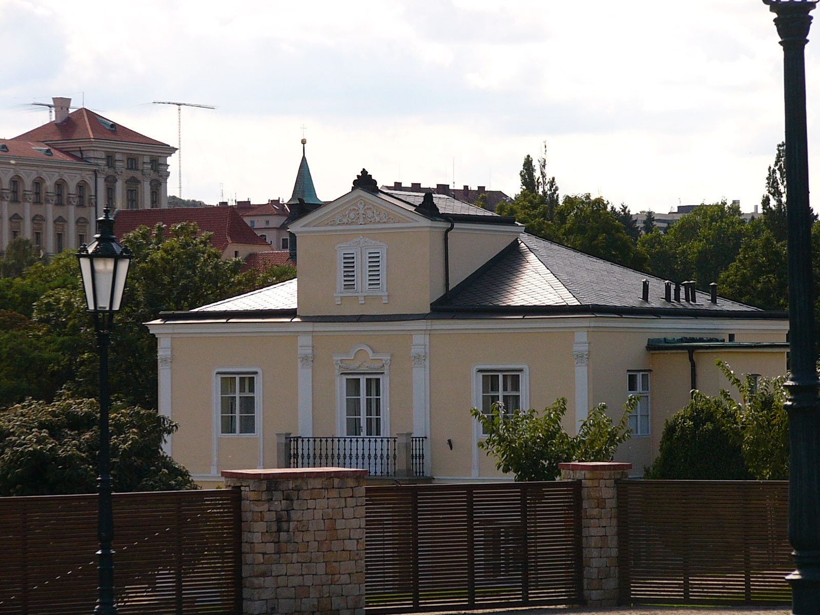 Lumbeho vila, rezidence Prezidenta republiky. Pohled z Lumbeho zahrady